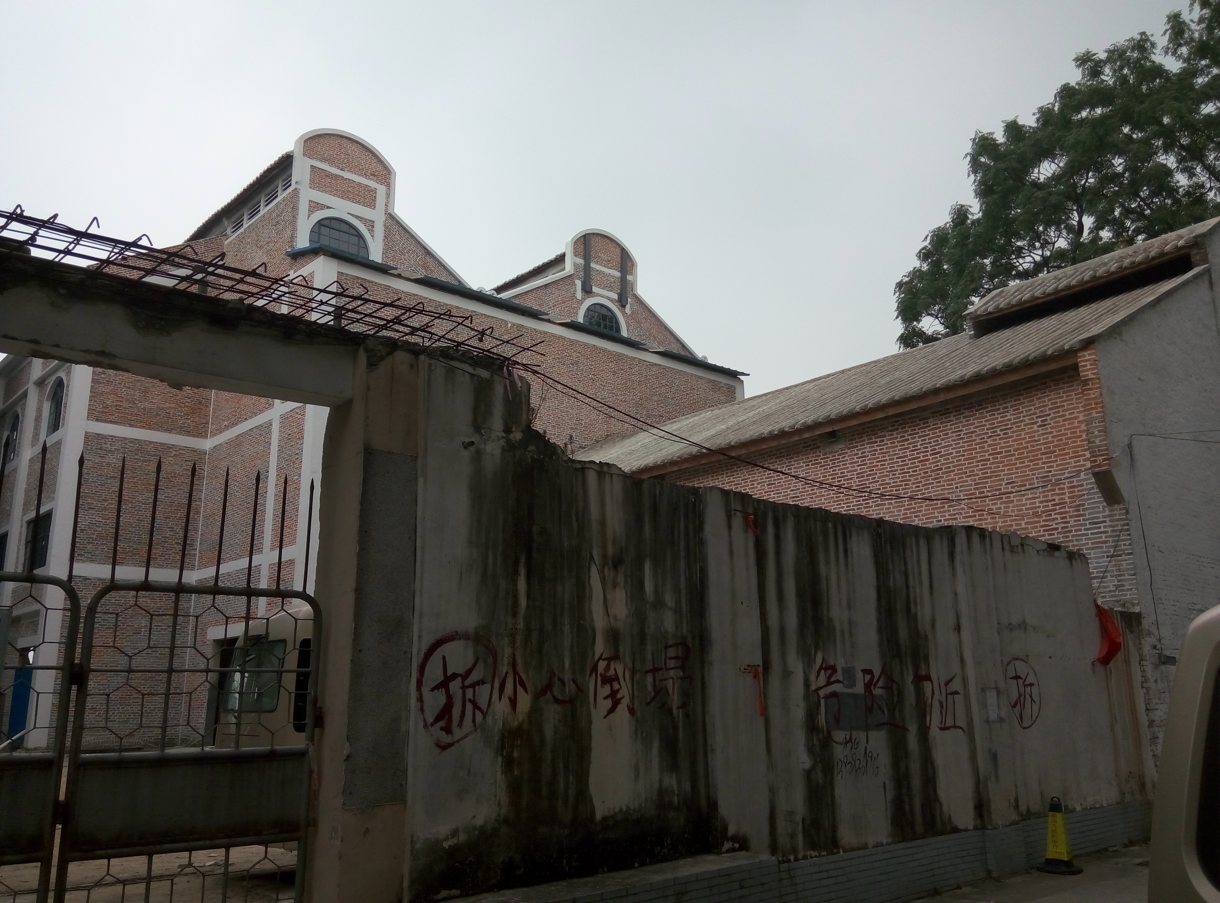 粵語: 鳳凰崗 誠志倉新樣